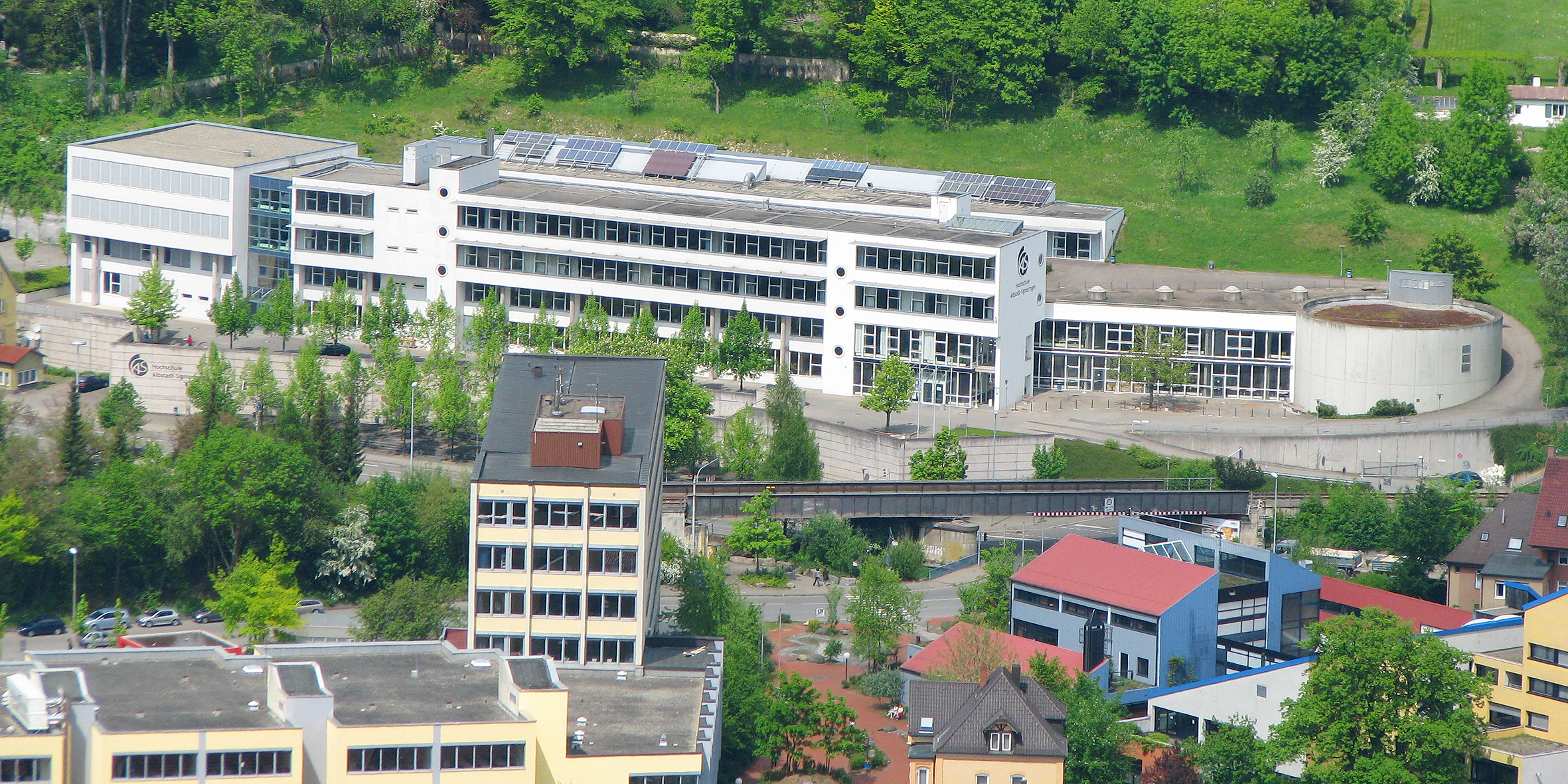 Hochschule Albstadt-Sigmaringen Standort Albstadt (Bei Bildverwendung bitte Information an Hochschule Albstadt-Sigmaringen, PR-Referat, Raum 105 A/B, Anton-Günther-Str. 51, 72488 Sigmaringen)